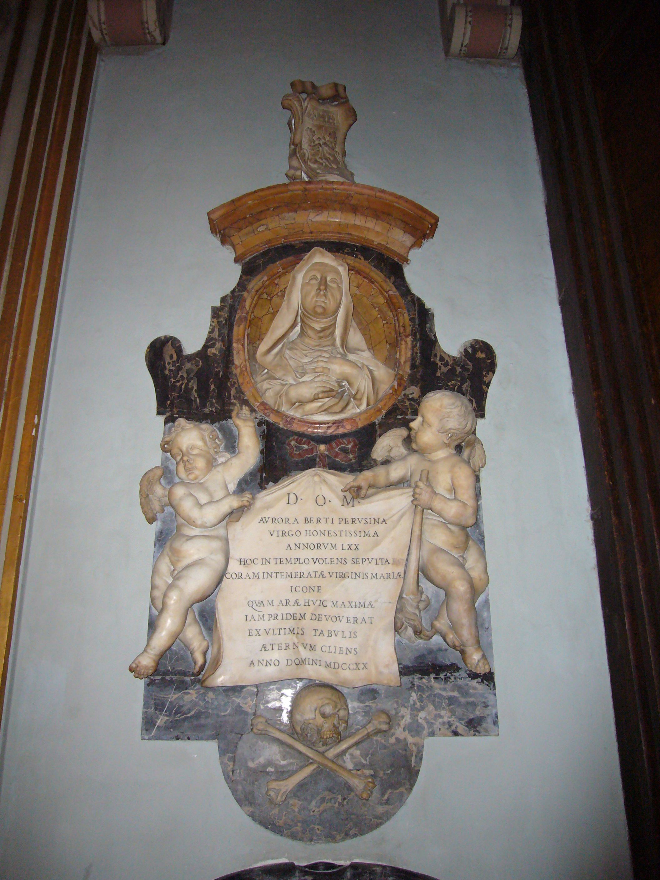 Roma, san Pantaleo - monumento funebre di Aurora Berti, virgo honestissima annorum LXX